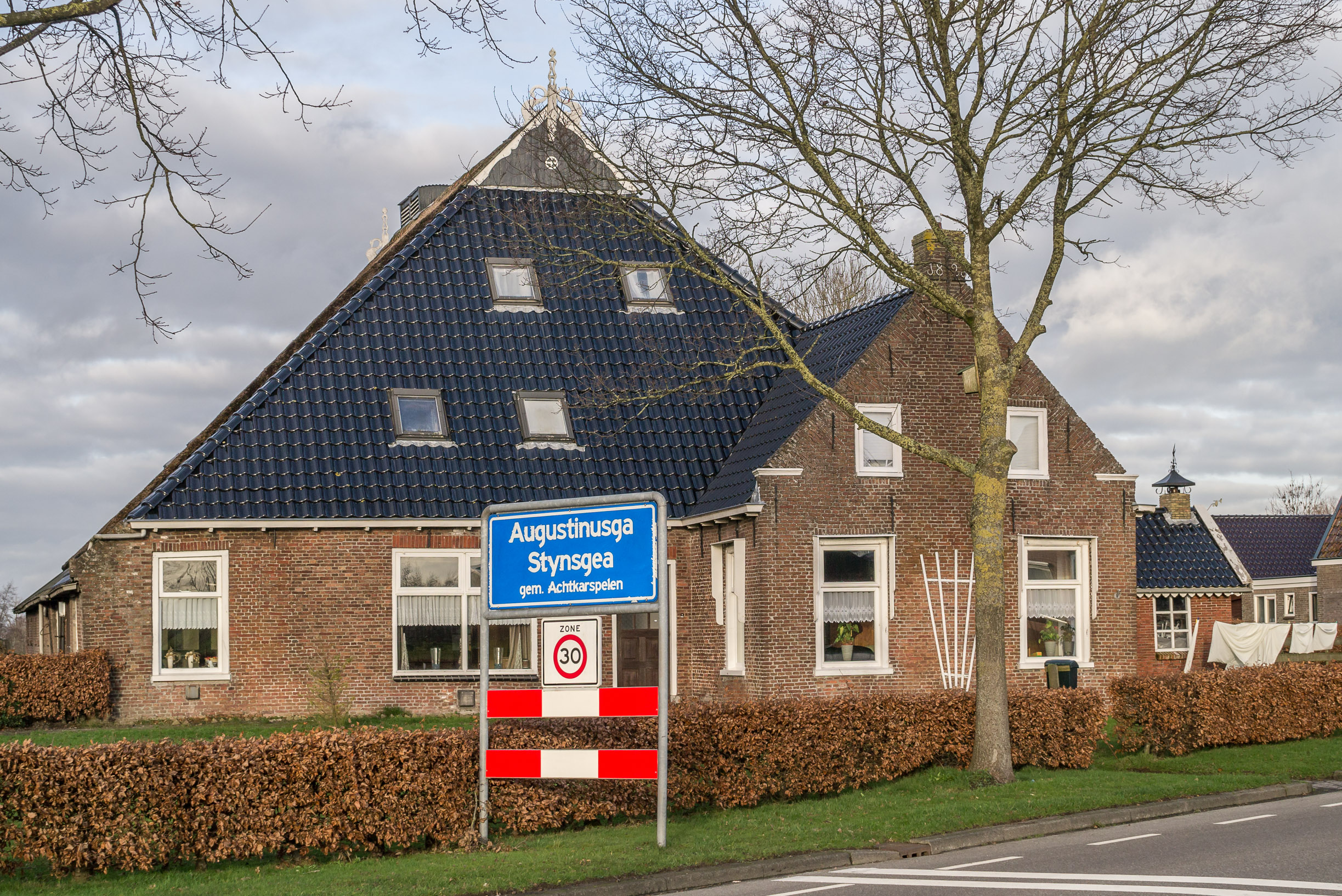 Augustinusga plaatsnaambord en boerderij